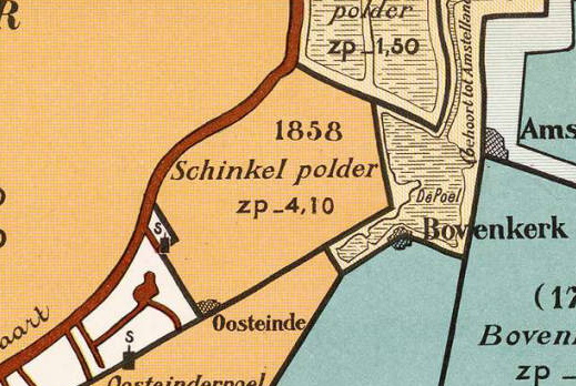 Schinkelpolder